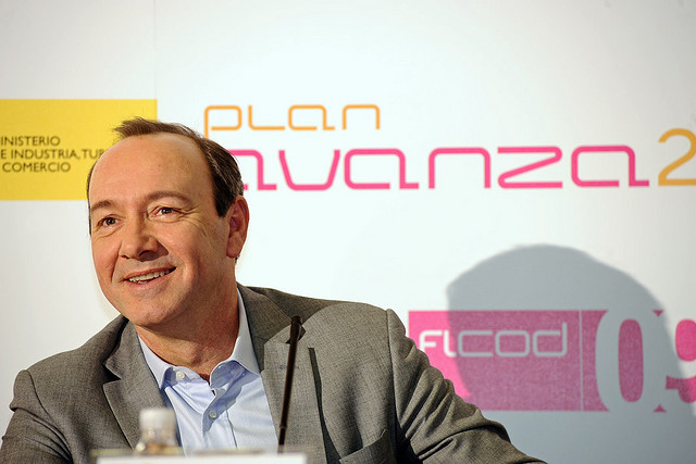 Sesión Plenaria de Kevin Spacey en FICO 09 a tenor de su película sobre los fundadores de Facebook